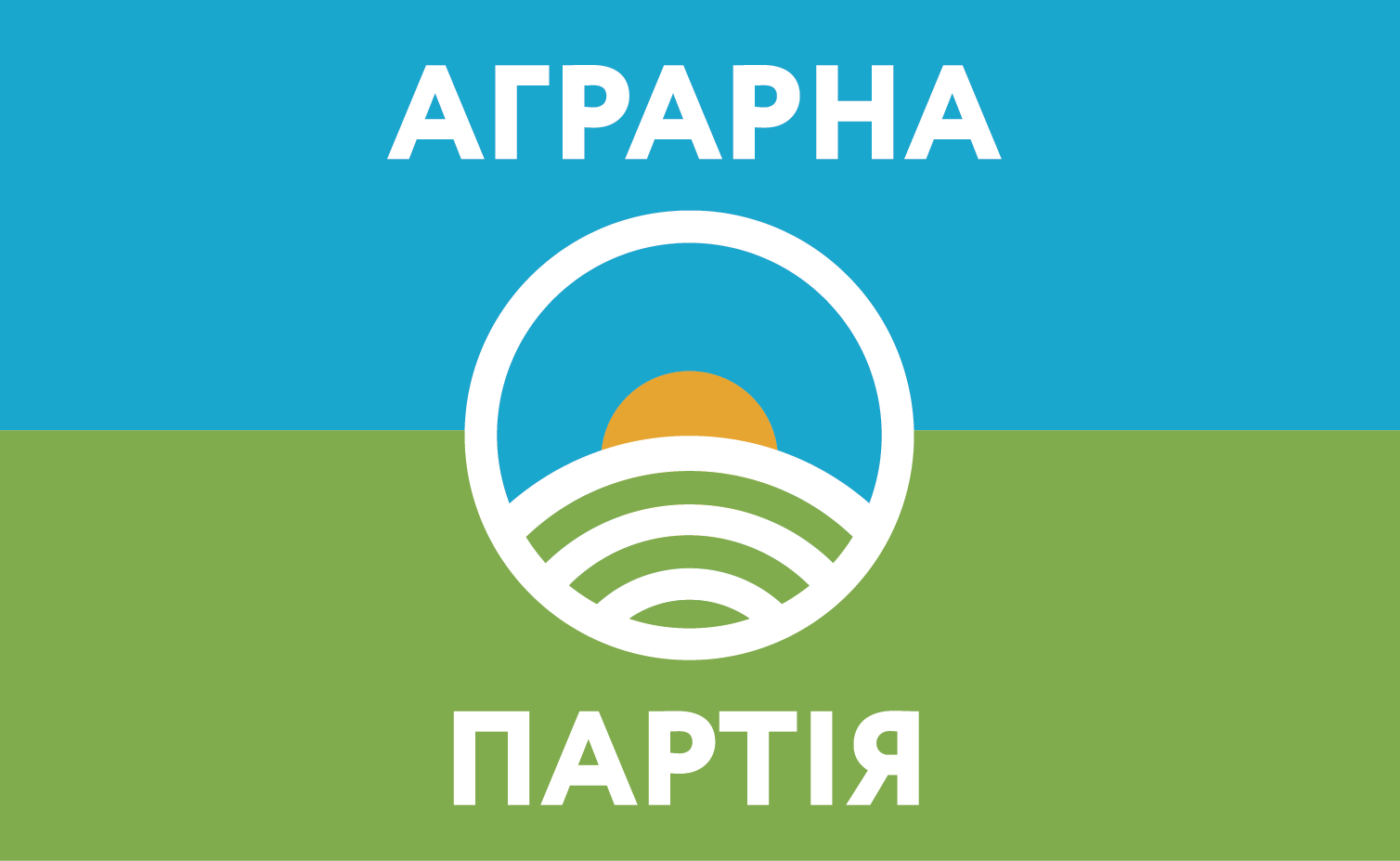 Прапор Аграрної партії прийнятий 10-тим з’їздом партії.